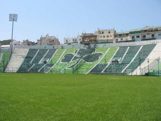 das bild habe ich selbstständig im sommer 2004 und nach einwilligung eines verantwortlichen geschossen. es zeigt die westtribüne des stadions. Bildbeschreibung: Westtribüne des "Apostolos Nikolaidis" - Stadions Quelle: selbst fotografiert Fotograf/Zeichner: Galis Datum: Sommer 2004 andere Versionen: keine